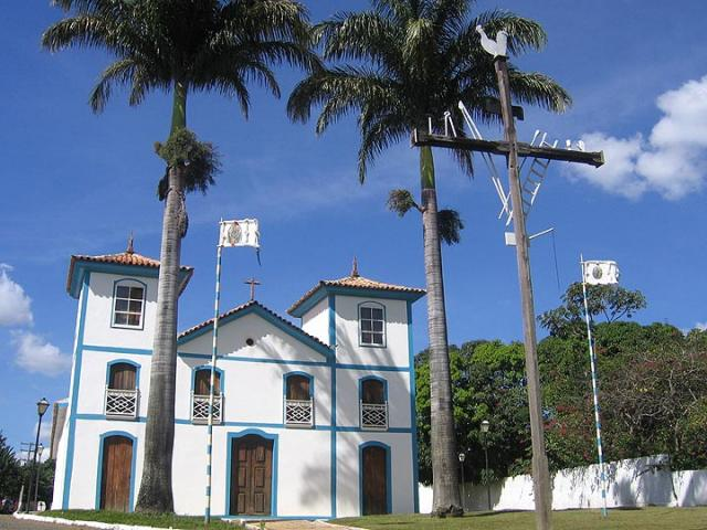 Igreja de Nosso Senhor do Bonfim, Pirenópolis, Brasil.